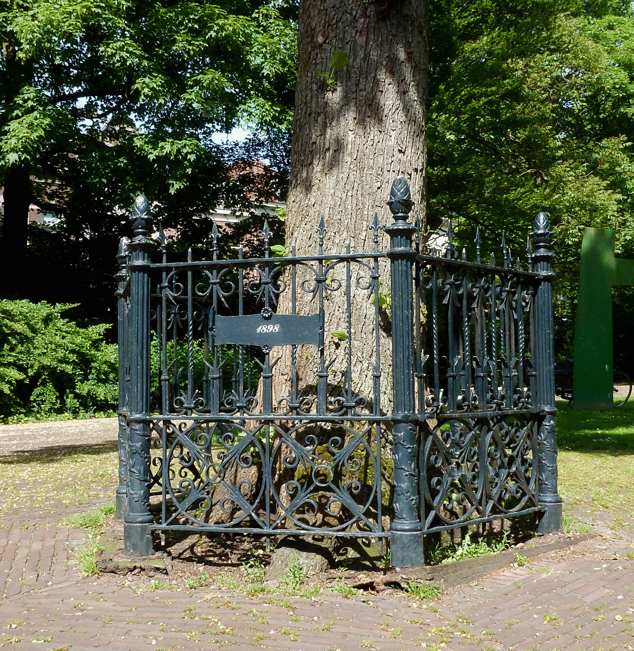 Boombescherming voor de Wilhelminaboom. Het is een gedenkteken voor de troonopvolging van Koningin Wilhelmina en een Rijksmonument